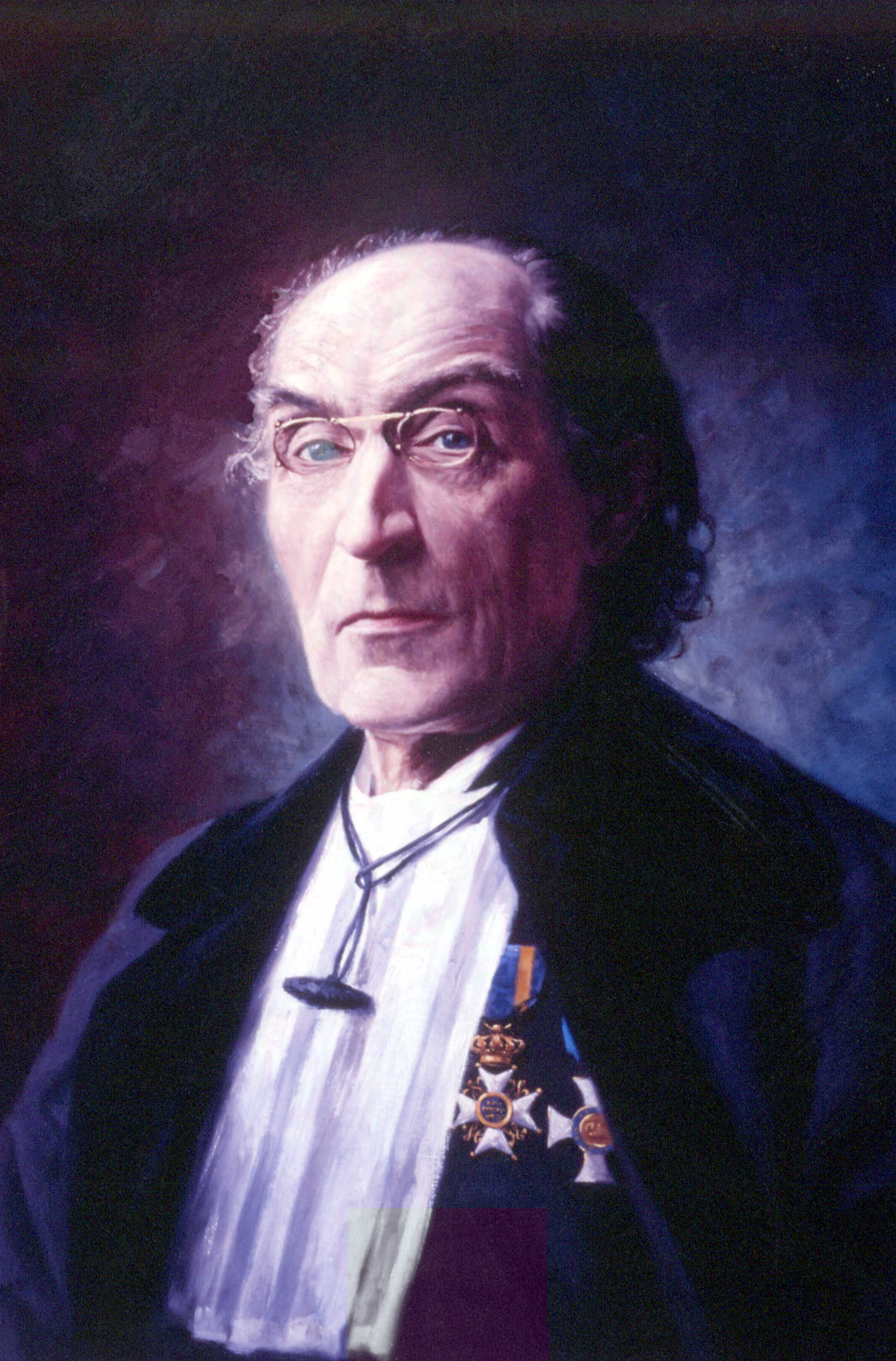 Josué Jean Philippe Valeton (1848-1912), hoogleraar en rector magnificus Utrecht